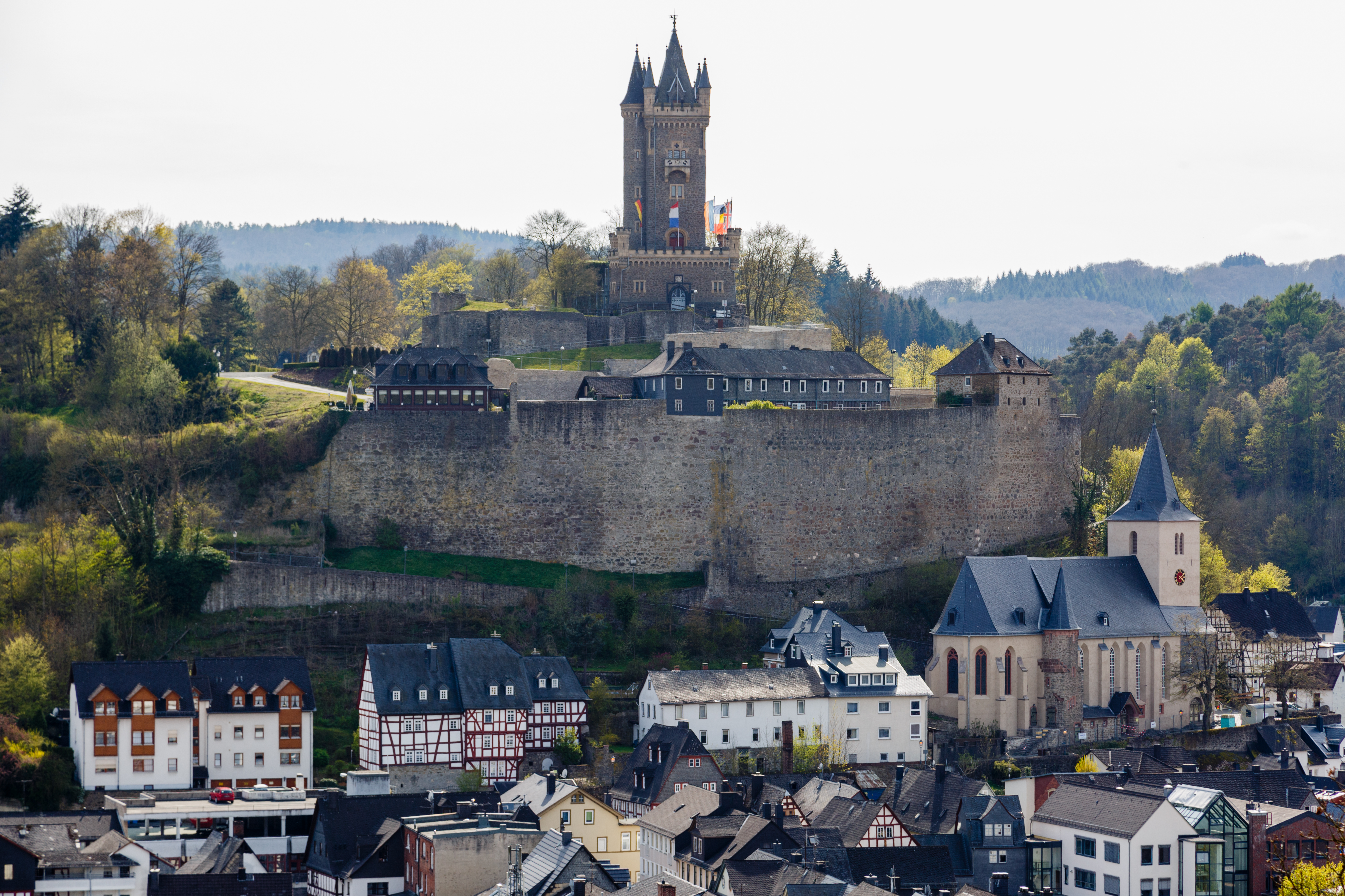 Dillenburg - Schloßberg Gesamtanlage